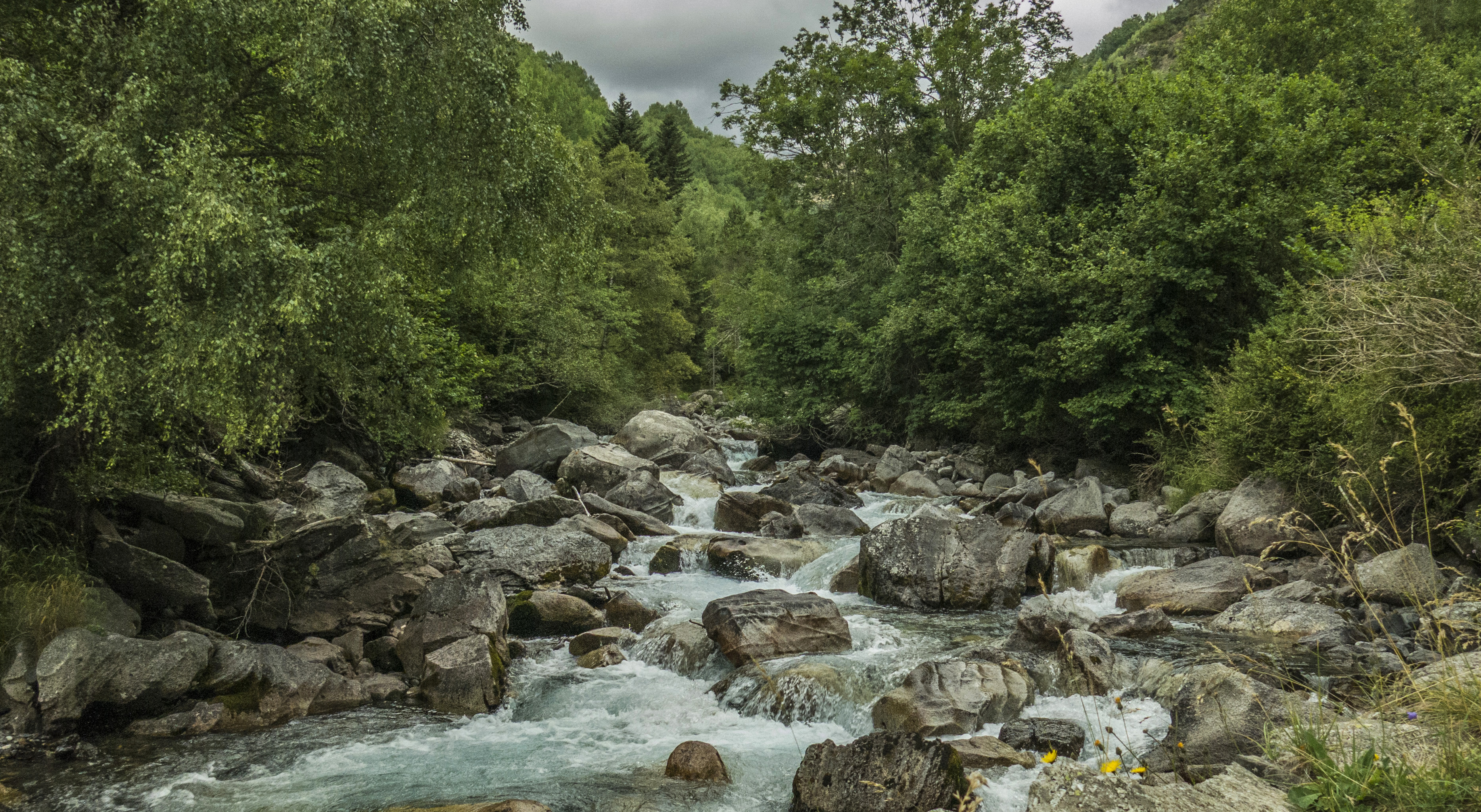 Afluent de l'Éssera, Parc Natural de Pocets-Maladeta (Osca).